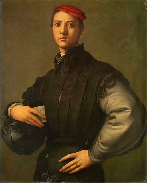 (Carlo Neroni)